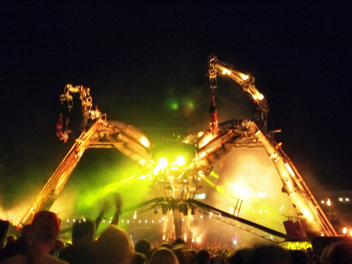 Arcadia